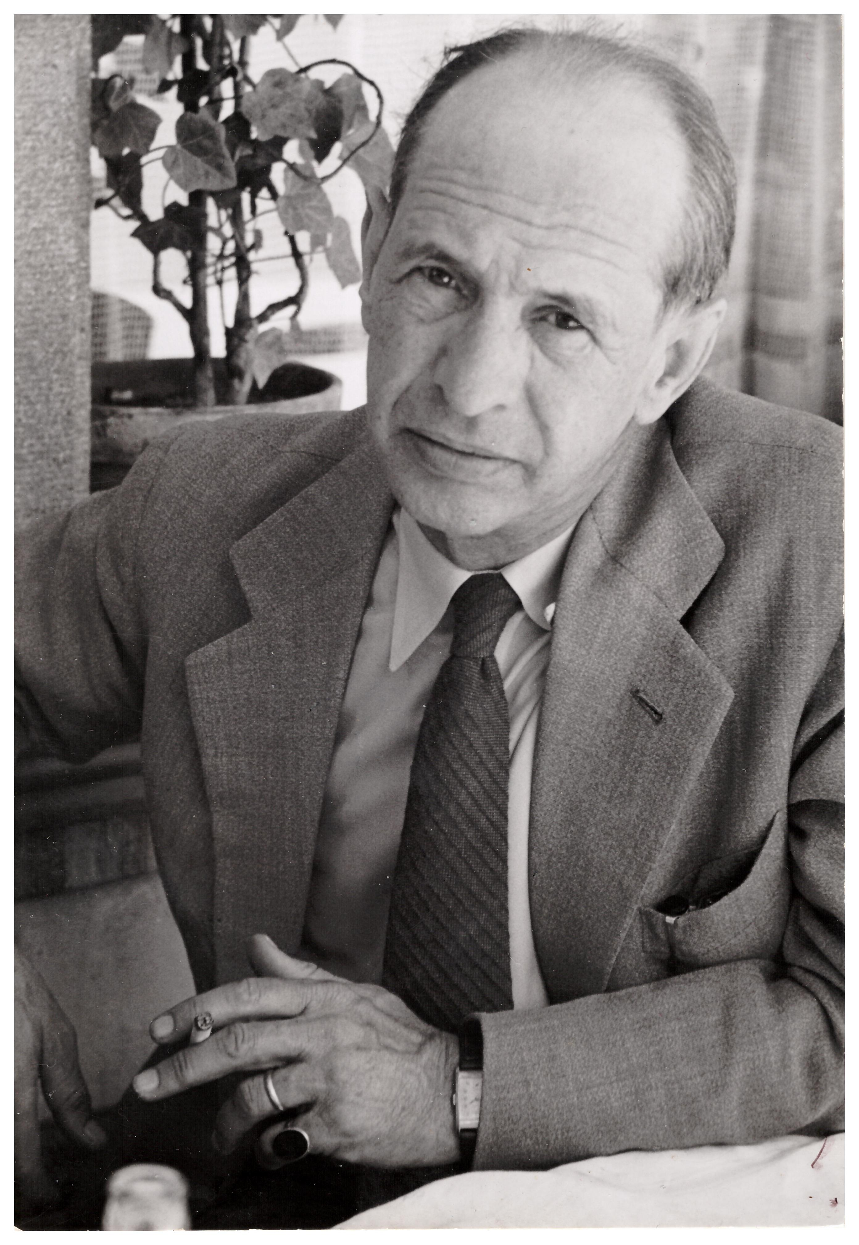 Hans Trüb im Sommer 1949, wenige Wochen vor seinem Tod